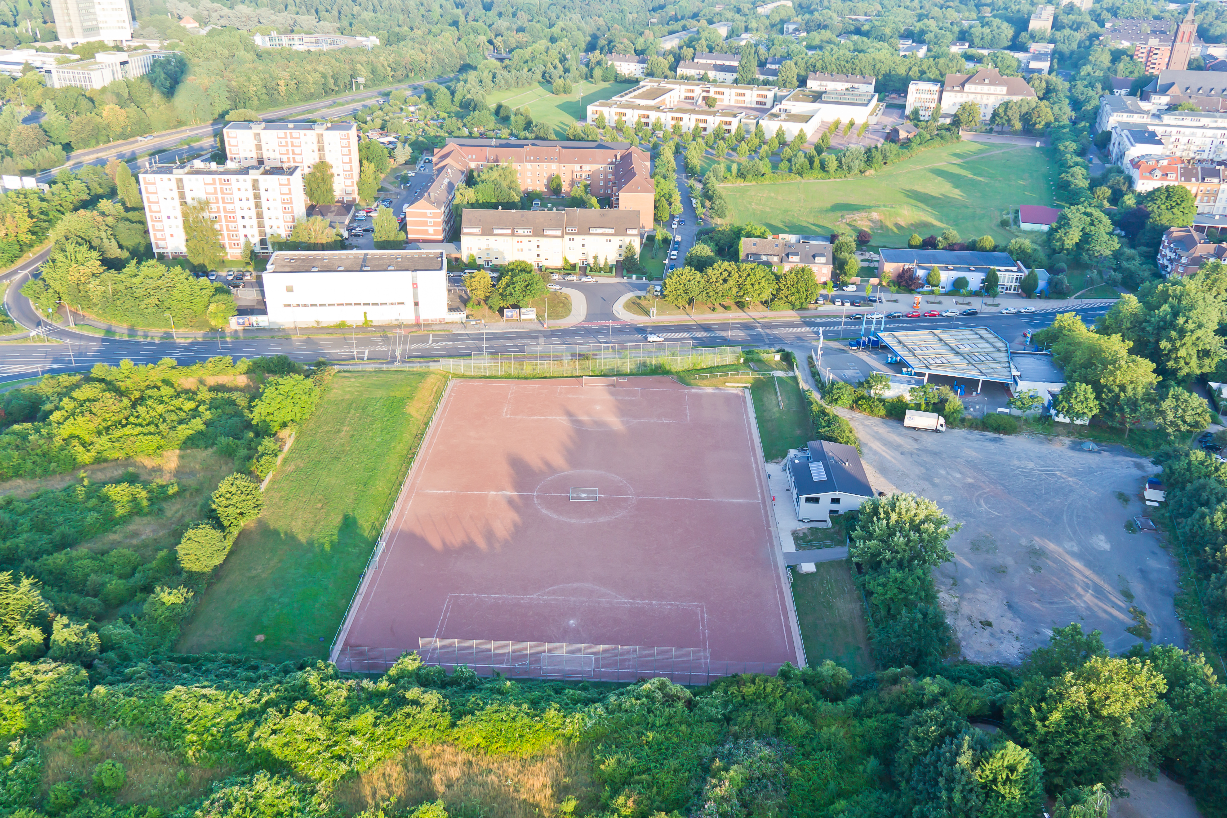 Ballonfahrt über Köln. Vordergrund: Sportplatz (Ascheplatz) an der Rolshover Straße. Mitte: Wohnbebauung Rolshover Straße/Singhofener Straße/Sauerlandstraße. Hintergrund: Georg-Simon-Ohm-Schule